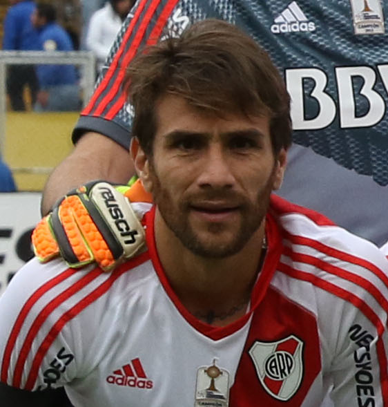 Leonardo Ponzio